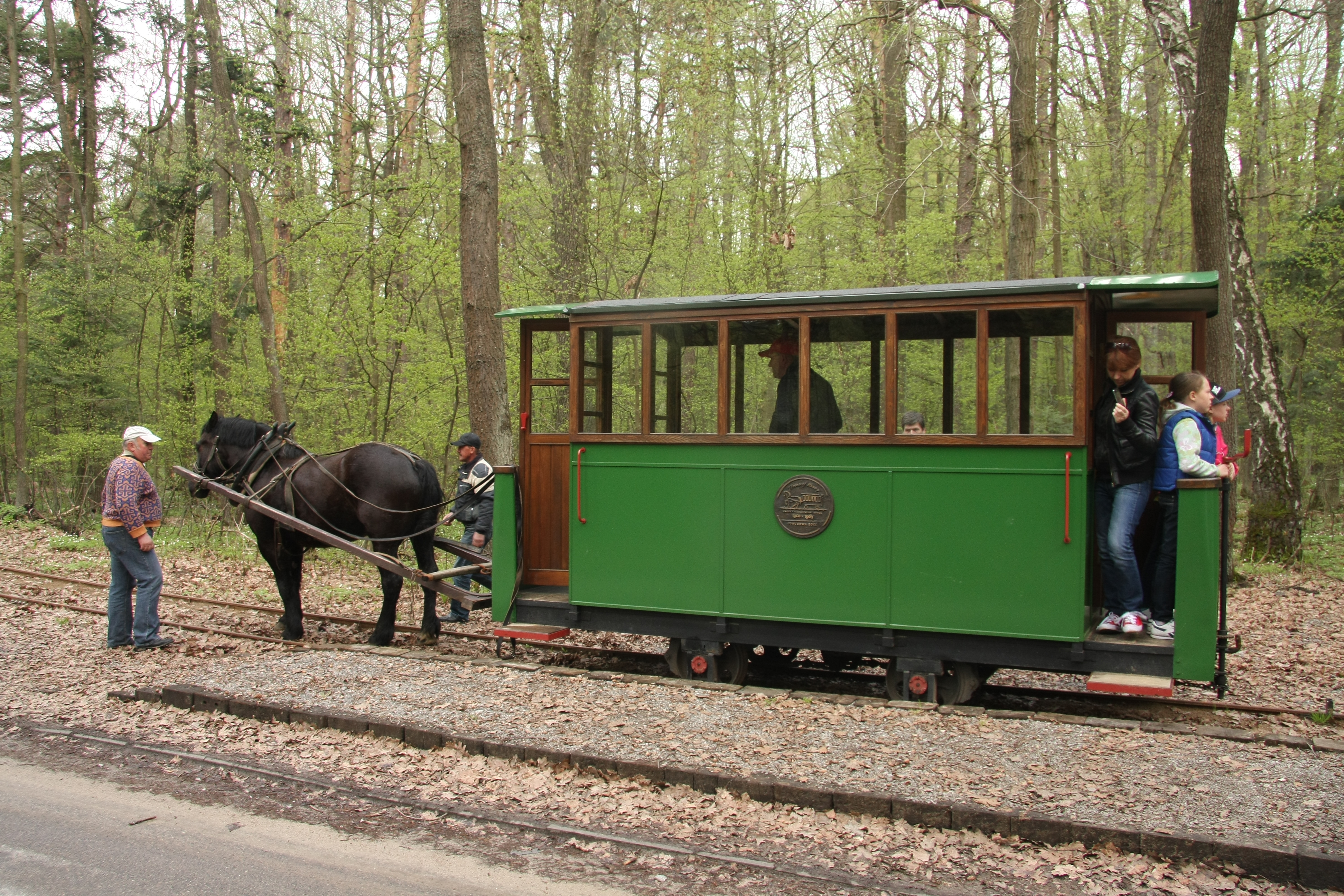 Tramwaj konny w Mrozach, stacja w Rudce